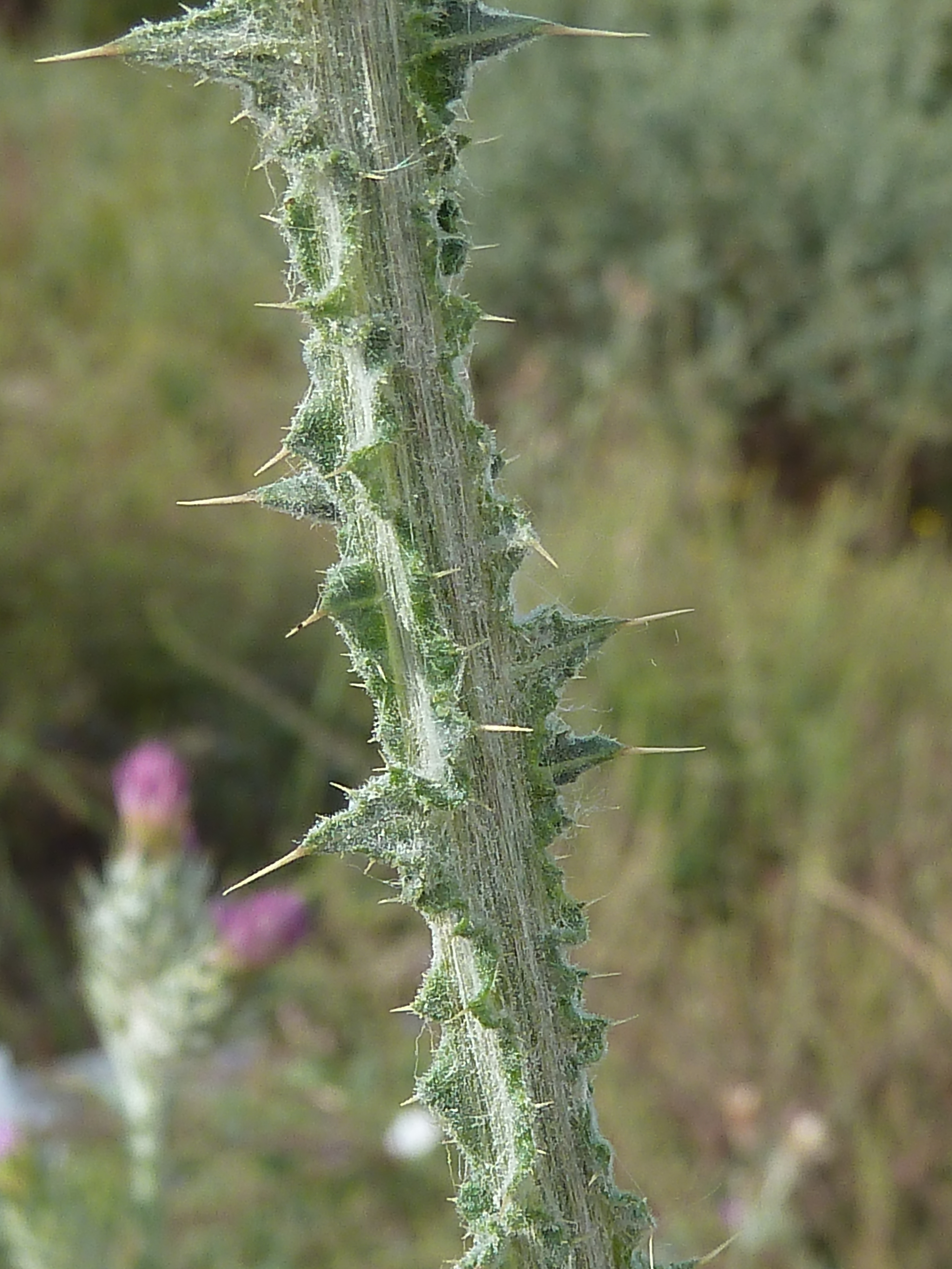 Carduus pycnocephalus (cardo, cardo borriquero, cardo negro) - Tallo alado: detalle. - Descampado circa Biblioteca, Albatera (Ptovincia de Alicante, España).